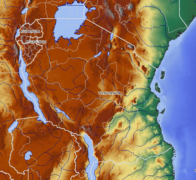 Map of Tanzania